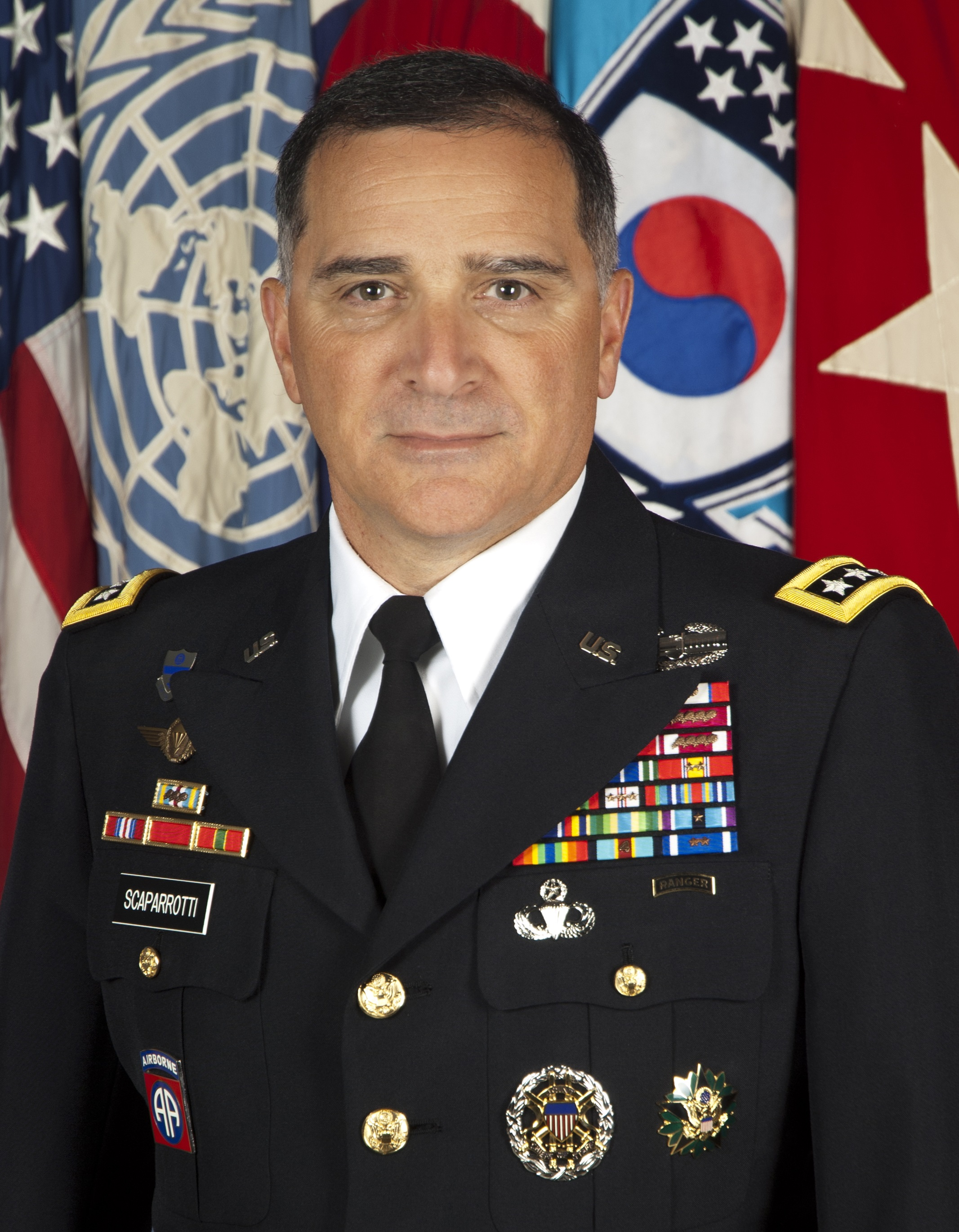 GEN Curtis M. Scaparrotti, Commander U.S. Forces Korea/United Nations Command